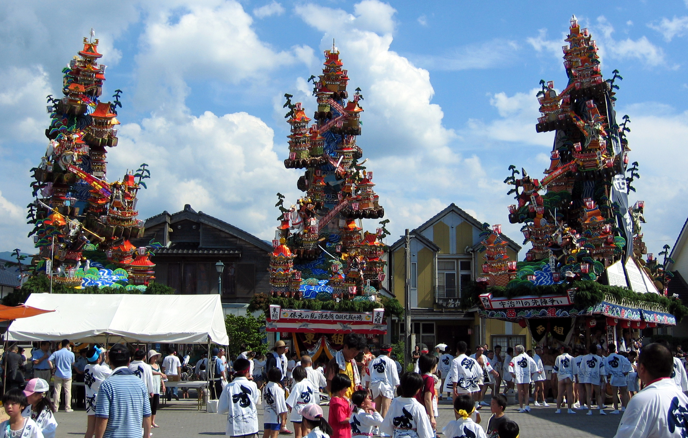 Hamasaki Gion Yamakasa(浜崎祇園山笠), saga, Japan.